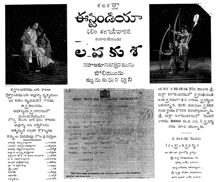 1934 లవకుశ చిత్రానికి ఆంధ్ర పత్రికలో ఇచ్చిన ప్రకటన